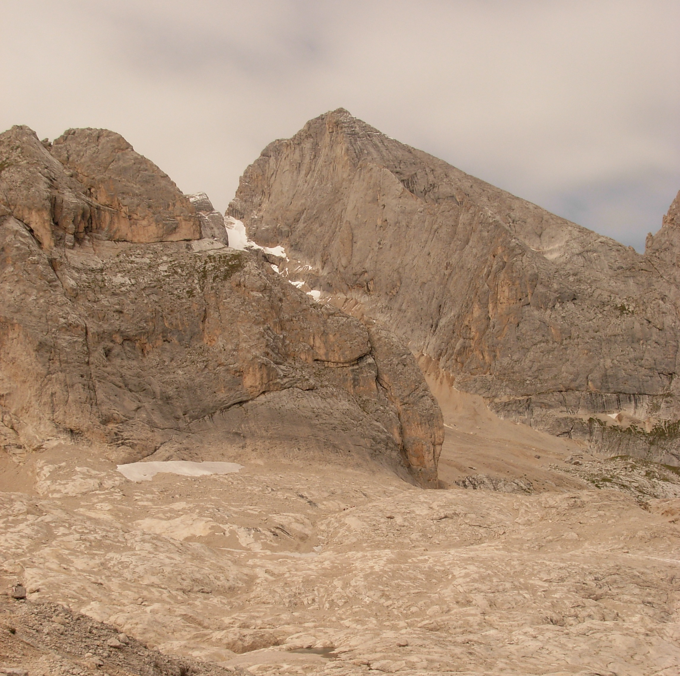 Typical yellowish color of Dolomites/TIpiškos gelsvos dolomitų uolienos